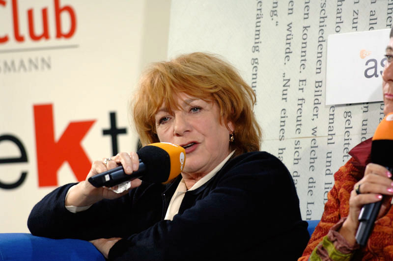 Hannelore Hoger. Dieses Fotos dürfen Sie honorarfrei nutzen, wenn Sie folgenden credit beachten: Copyright: Das blaue Sofa / Club Bertelsmann.